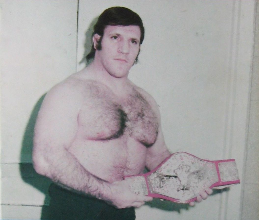 Couverture d'une édition spéciale d'un magazine papier. Le prénom Bruno est inscrit en lettres capitales blanches sur fond rose en haut et le texte Living Legend en bas en blanc sur fond bleu. La photo d'un catcheur torse nu tenant une ceinture de champion.